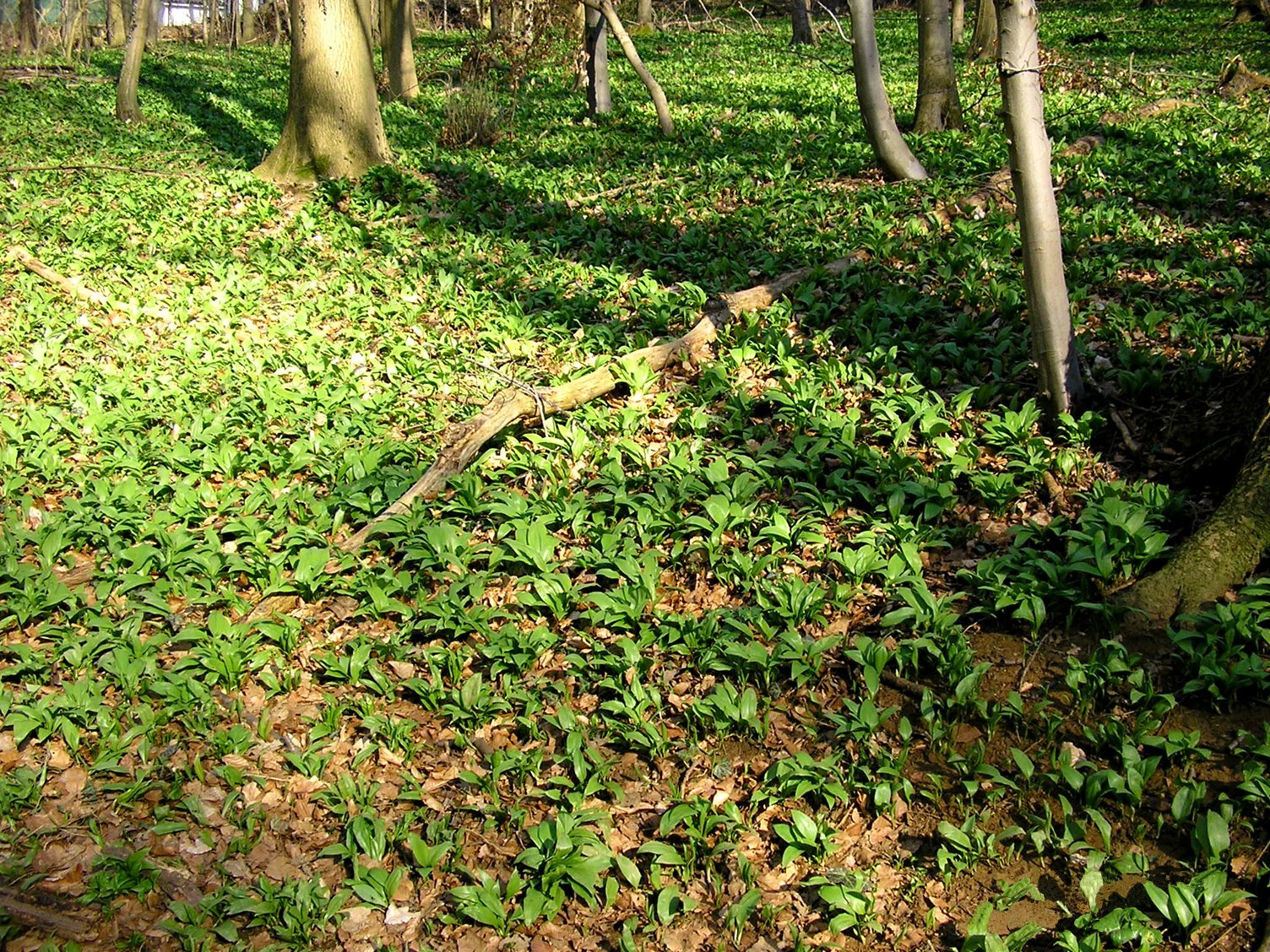 Bärlauchwiese im Wiehengebirge, NSG Sonnenwinkel